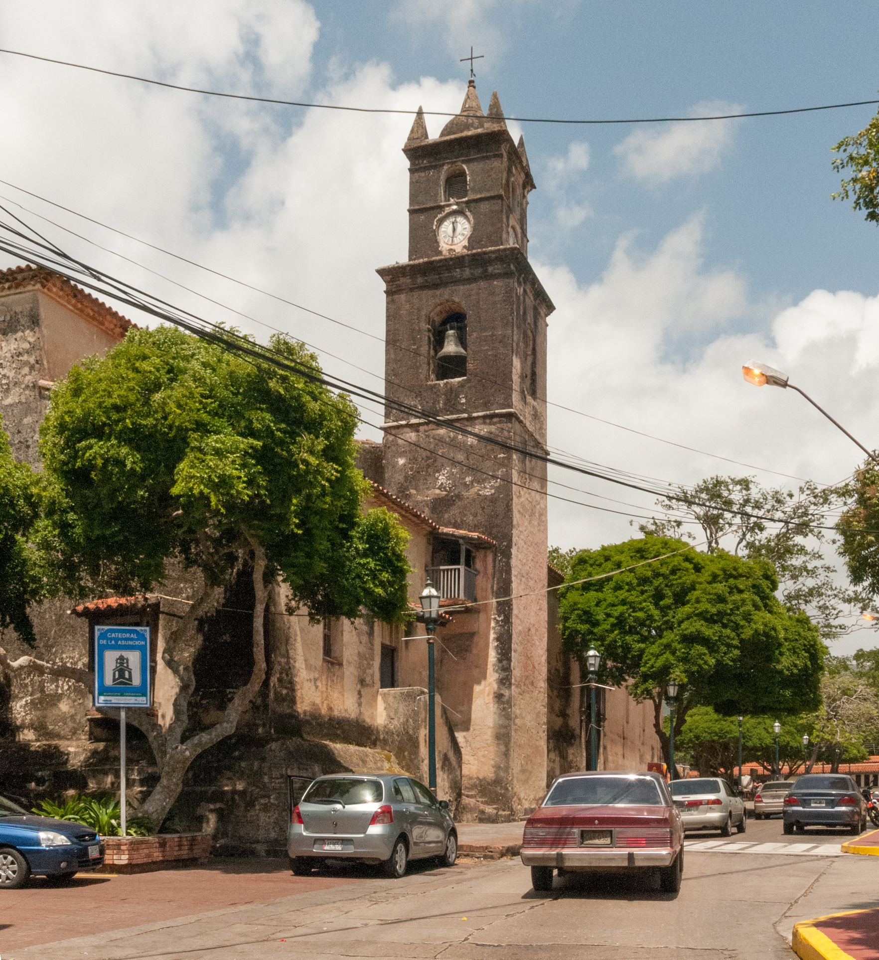 Catedral de La Asunción, Isla de Margarita